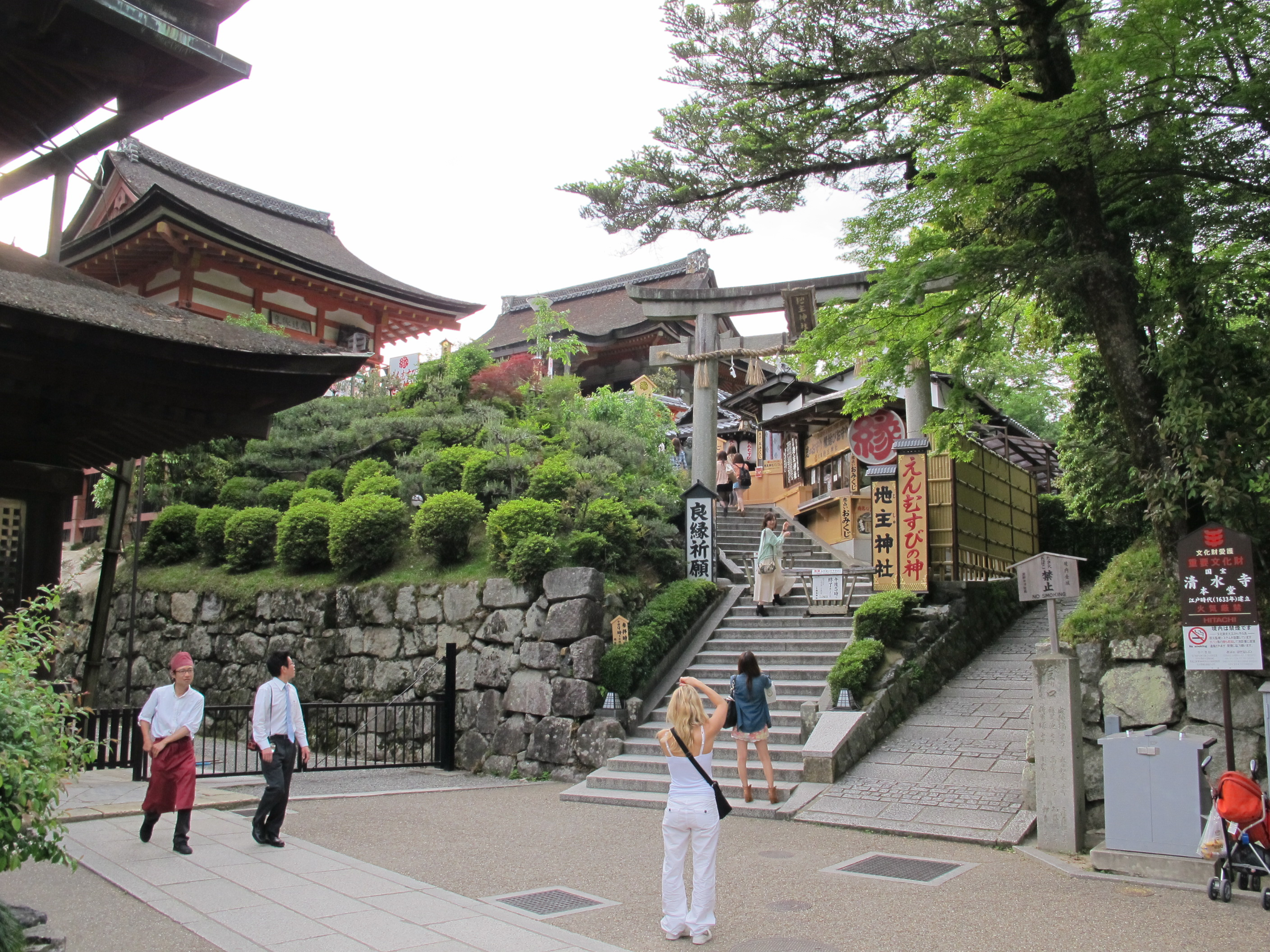 Santuario jishu